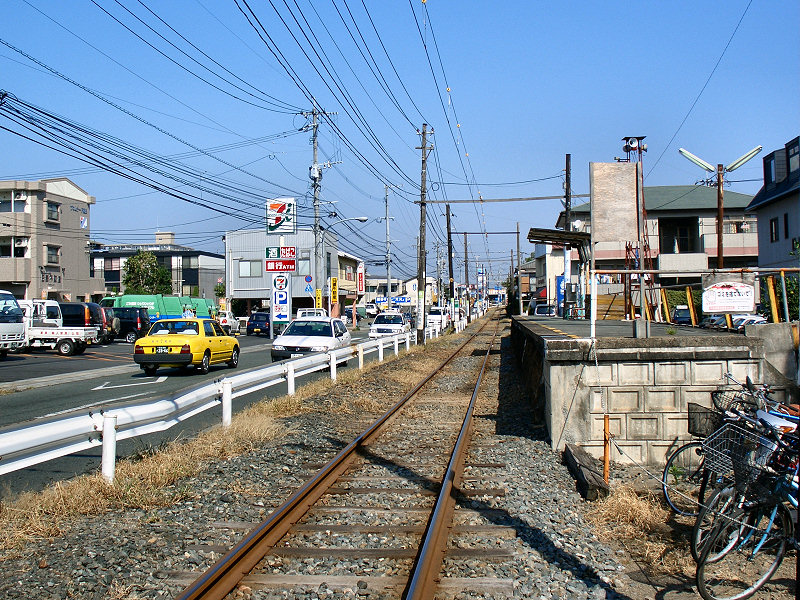 熊本電気鉄道亀井駅 奥が御代志駅方面、手前が北熊本駅方面。 撮影者/著者/著作権保有者 : MK Products (本人がアップロード) 撮影日 : 2006/09/24 亀井駅用にアップロードした画像です。良い画像があれば別の画像に変えてください。